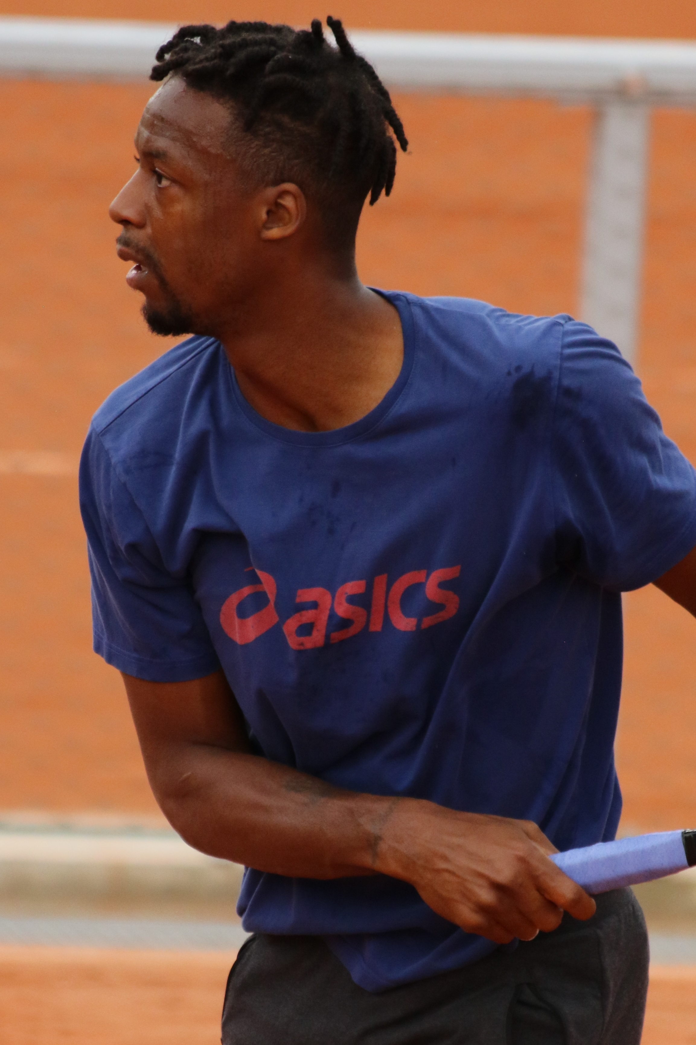 Monfils RG19 (13)